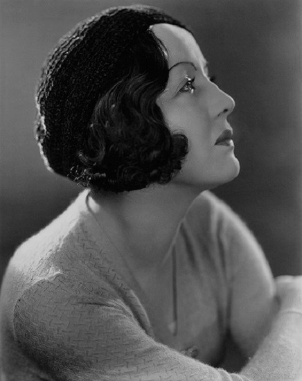 Dita Parlo